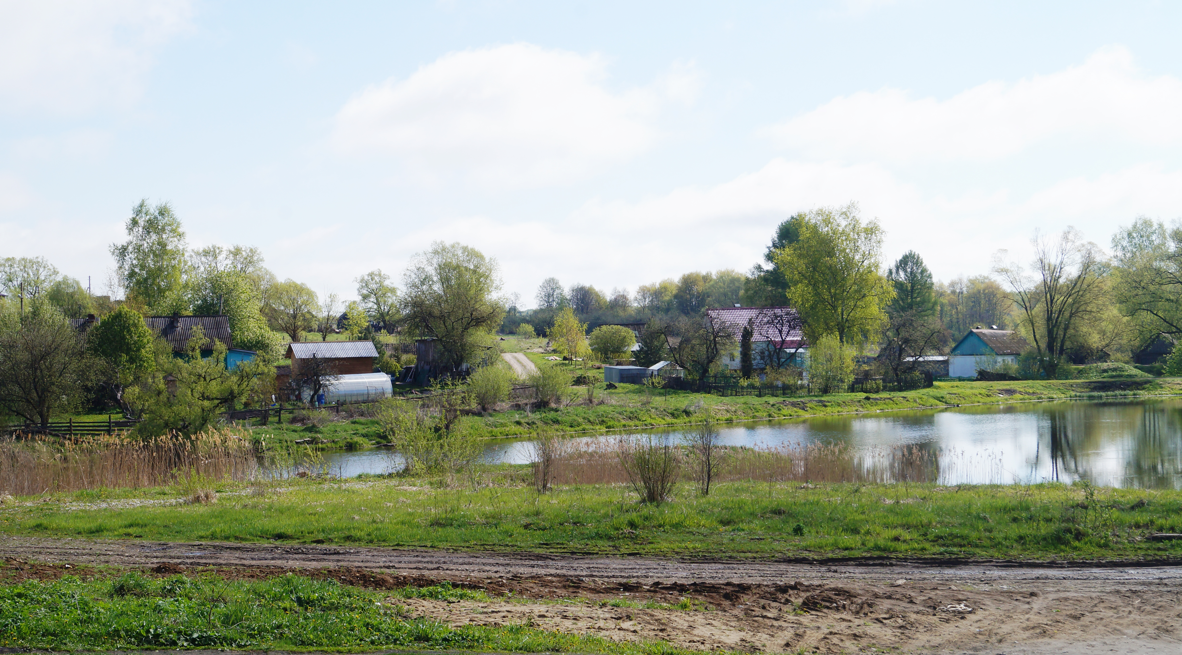 Маклаки (Думиничский район), пруд